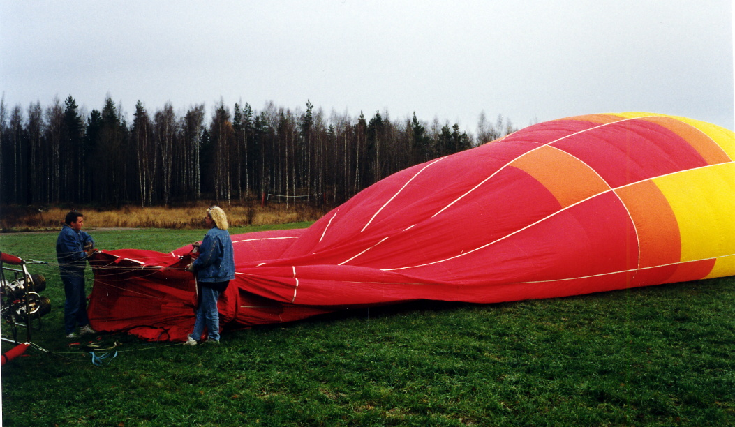 Kuumailmapallon täyttö ennen lentoonlähtöä Espoossa.